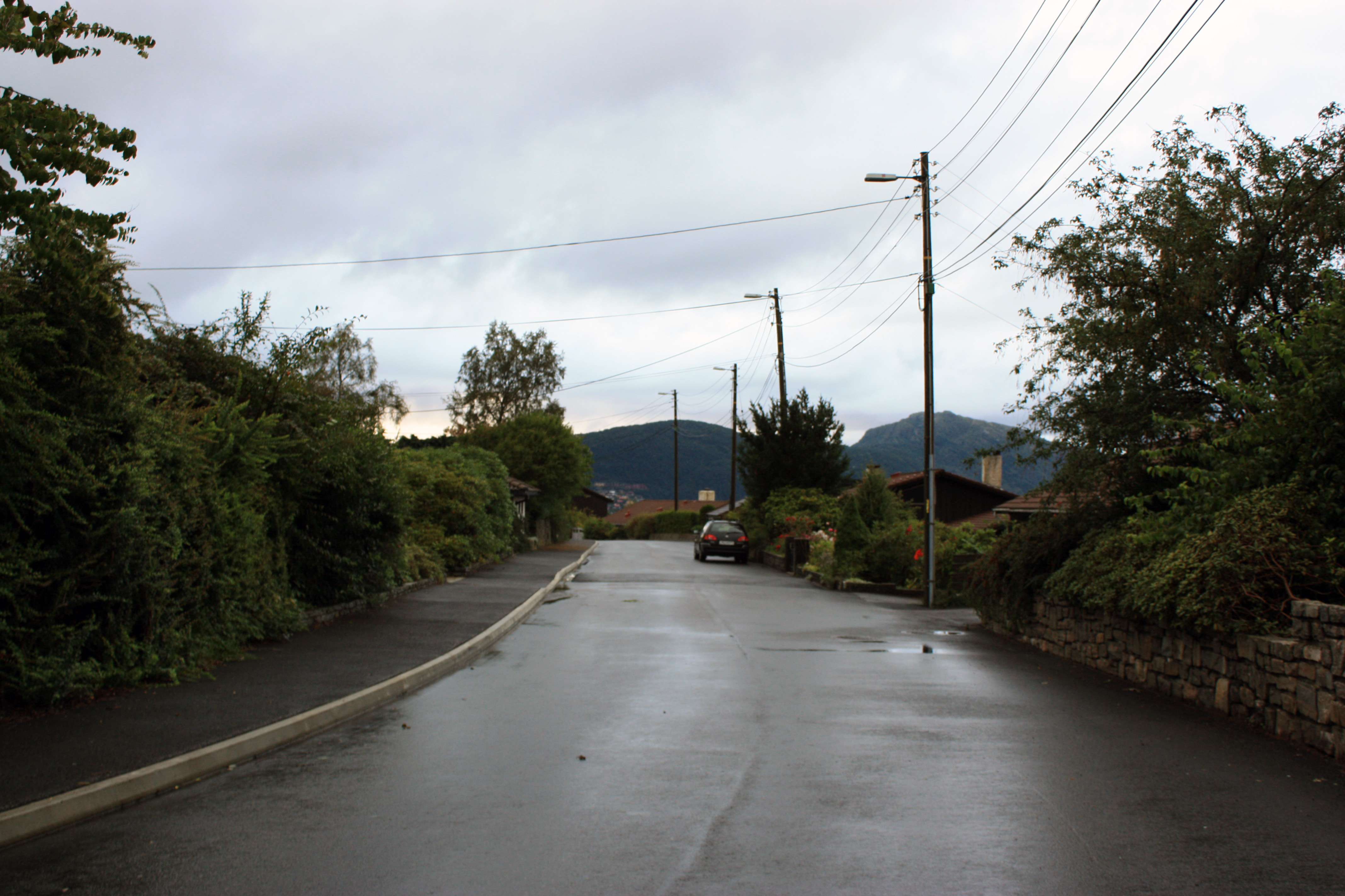 Skjoldhøgda, Fana, Bergen.